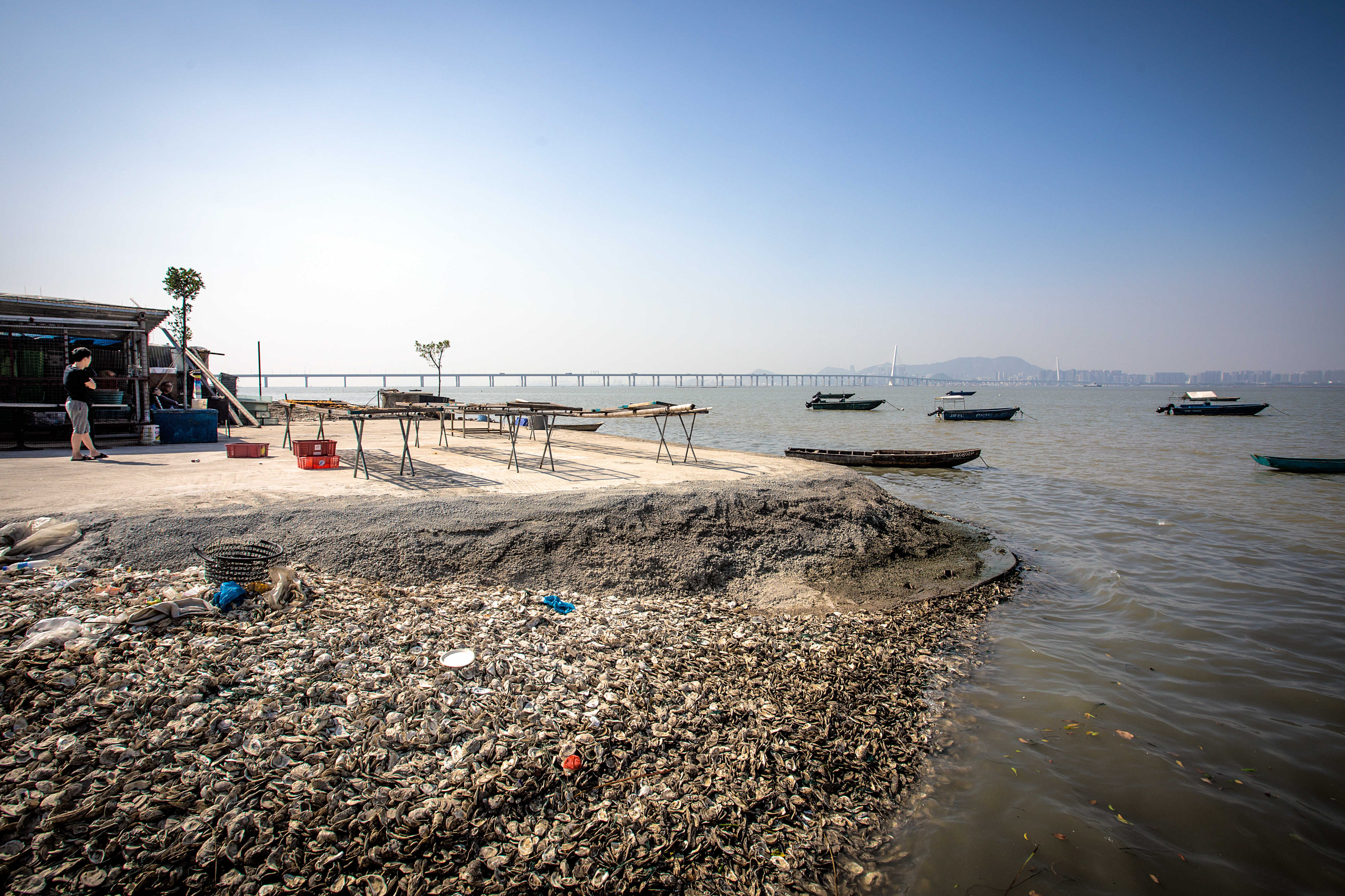 Lau Fau Shan